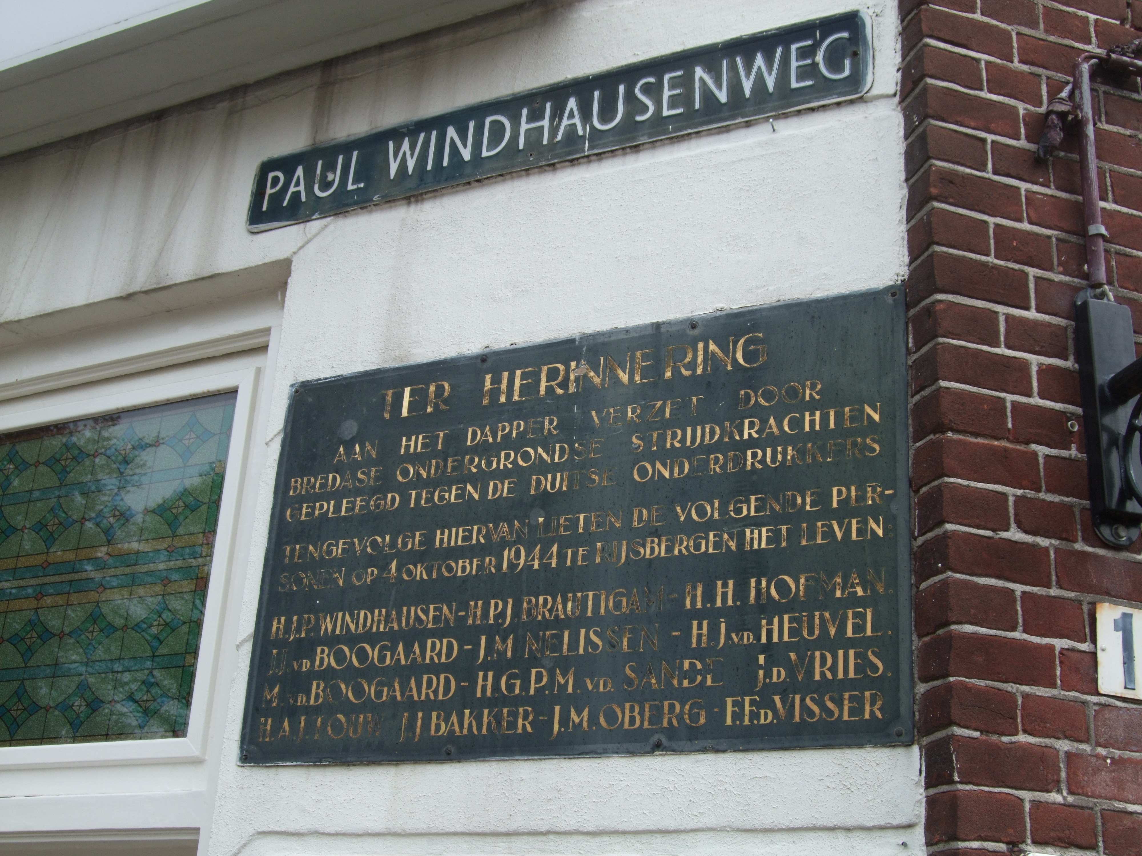 Vloeiweide monument, Breda aan de gevel van het cafe tegenover de Tank : Inscriptie luidt : 'TER HERINNERING AAN HET DAPPER VERZET DOOR BREDASE ONDERGRONDSE STRIJDKRACHTEN GEPLEEGD TEGEN DE DUITSE ONDERDRUKKERS TENGEVOLGE HIERVAN LIETEN DE VOLGENDE PER- SONEN OP 4 OKTOBER 1944 TE RIJSBERGEN HET LEVEN: H.J.P. WINDHAUSEN - H.P.J. BRAUTIGAM - N.H. HOFMAN. J.J. V.D. BOOGAARD - J.J. NELISSEN - H.J. V.D. HEUVEL. M. V.D. BOOGAARD - H.G.P.M. V.D. SANDE - J.D. VRIES. H.A.J. TOUW - J.J. BAKKER - J.M. OBERG - F.F.D. VISSER.'